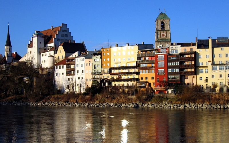 Wasserburg am Inn - Bayern - Deutschland